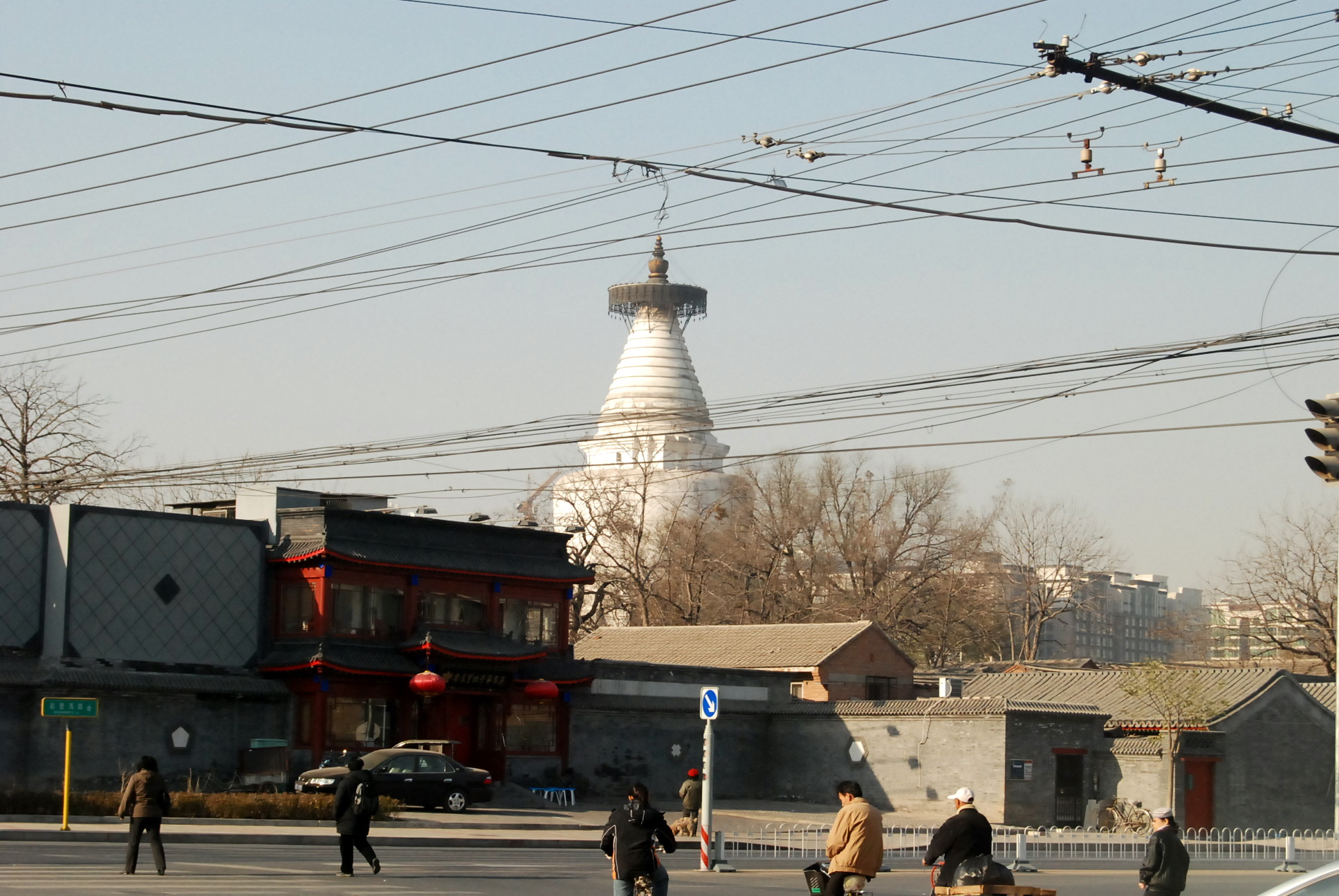 张自忠路望白塔寺